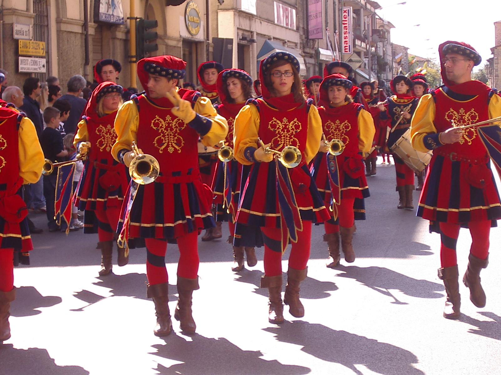 Chiarine della contrada "Il ponte"